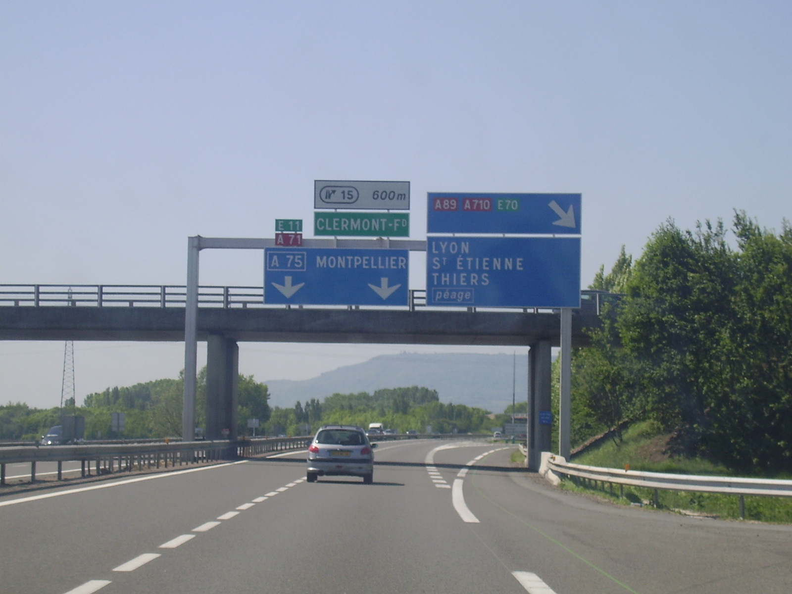 Échangeur A 71/A 89/A 710 : Signal avancé de bifurcation et pré-signalisation de la sortie 15 à 600 mètres (Clermont-Ferrand). L'autoroute a été élargie en 2014.